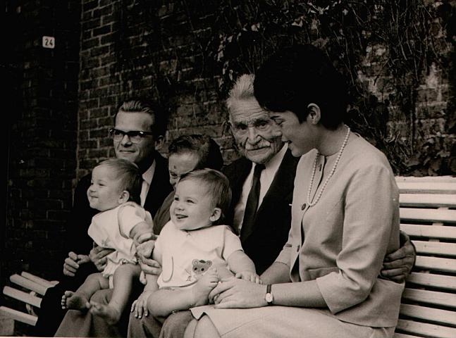 Stijn Streuvels en echtgenote Alida met kleinzoon Hans en kleindochter Leentje en tweeling-achterkleinkinderen Tom & Stef. Eigen foto uit familiearchief